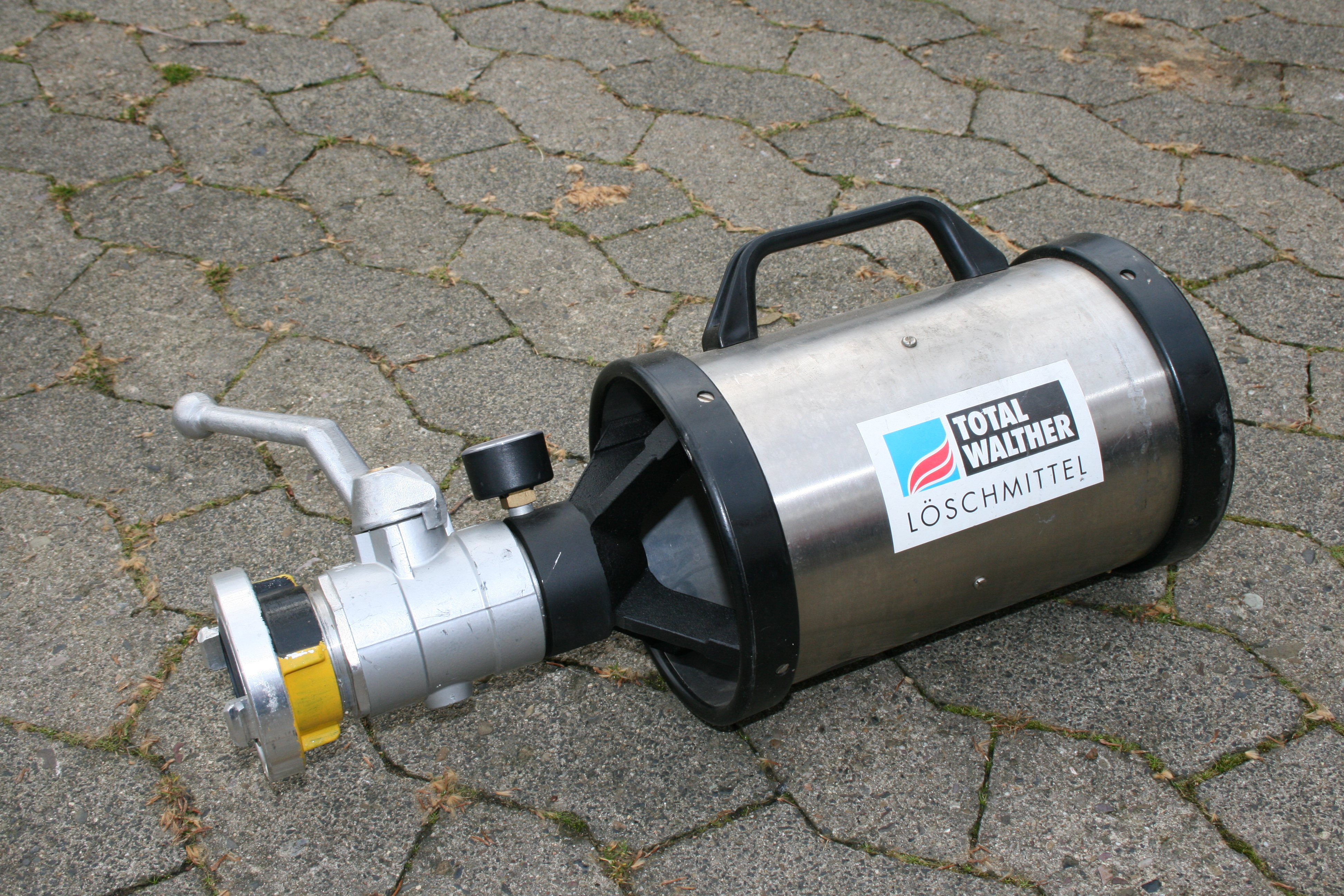 Mittelschaumrohr (Feuerwehr)